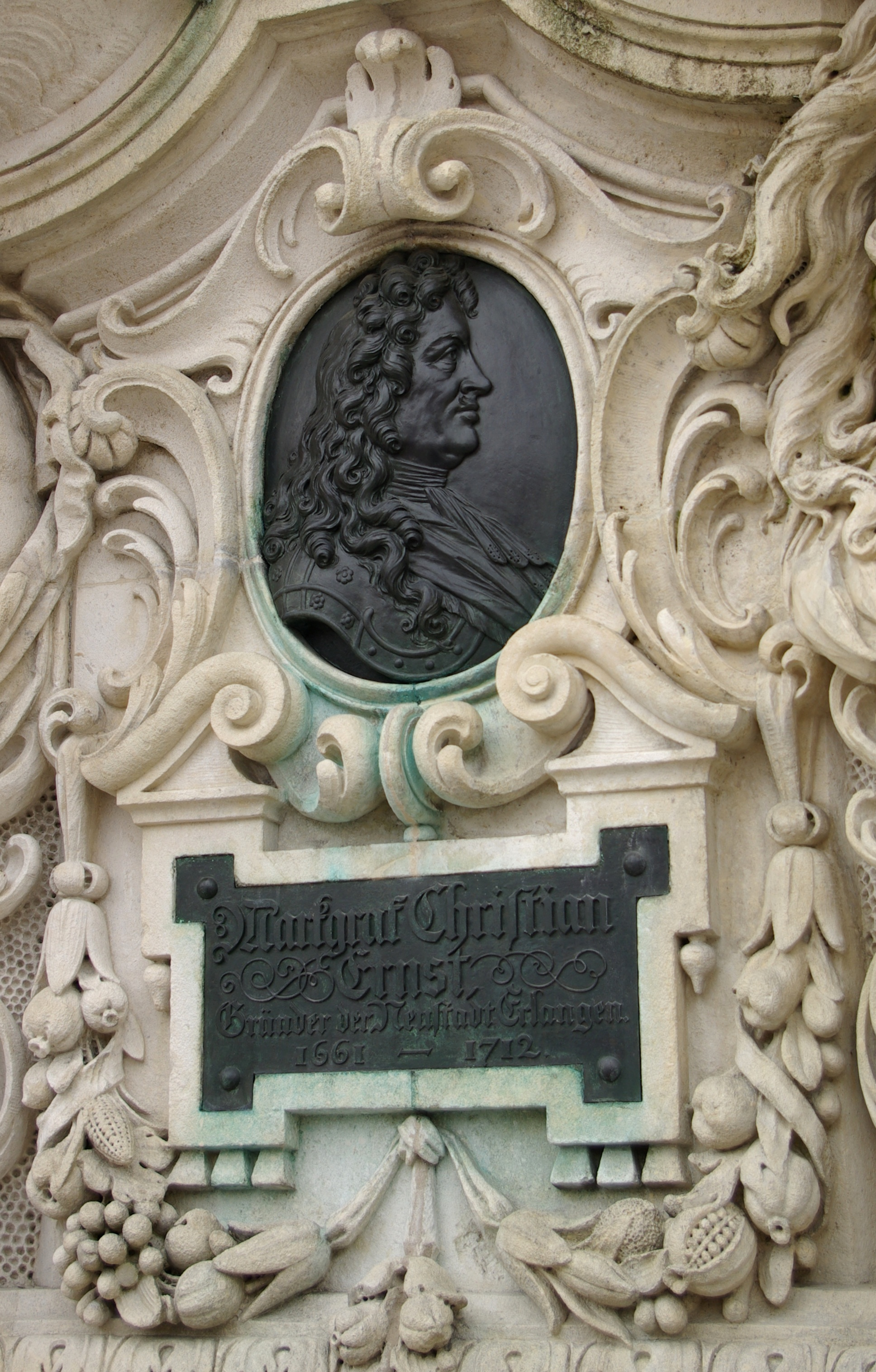 Reliefportrait des Markgrafen Christian Ernst von Brandenburg-Bayreuth am Mittelteil (Nordseite) des Paulibrunnens auf dem Erlanger Marktplatz.